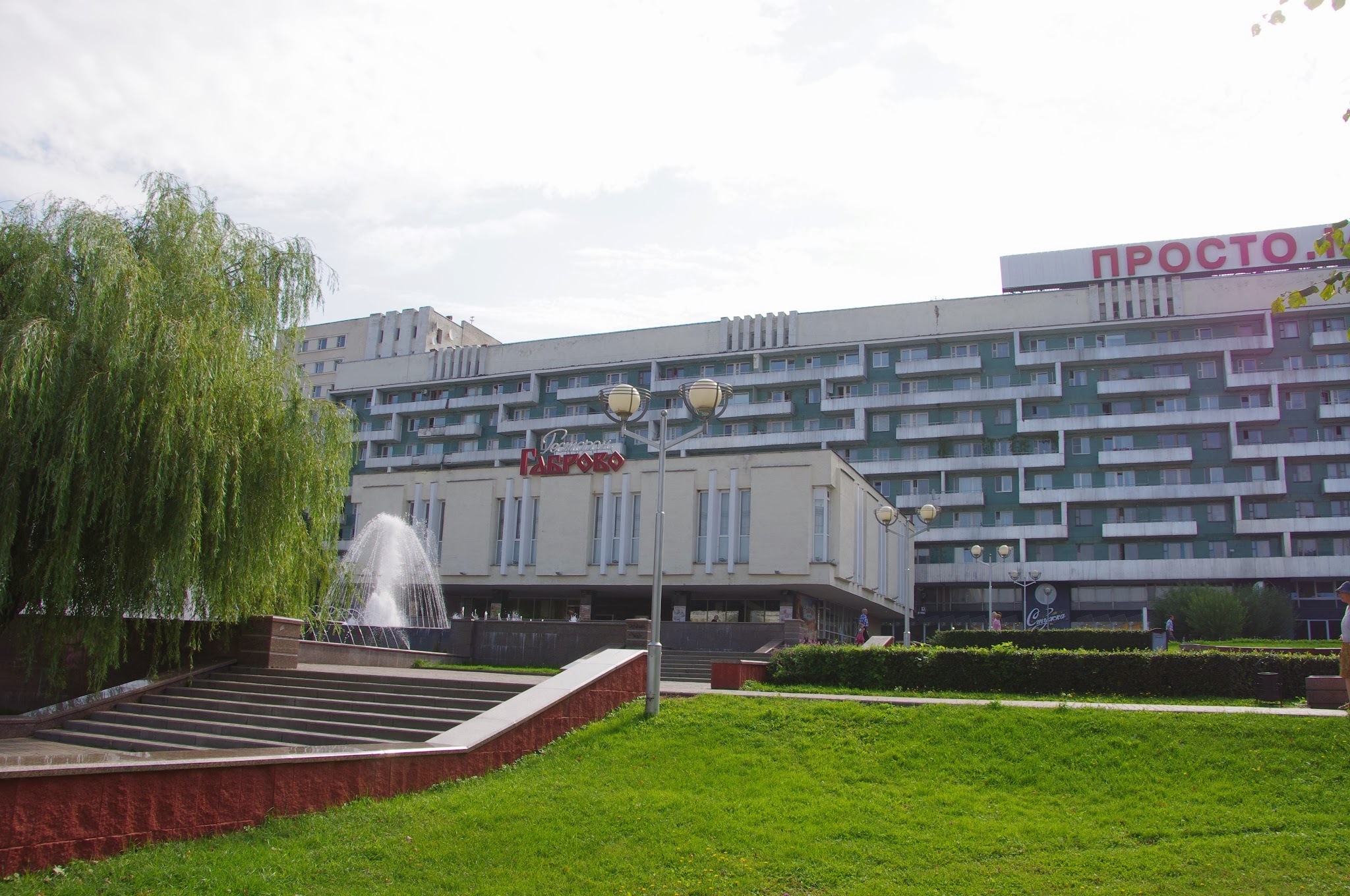 Lieninski District, Mogilev, Belarus